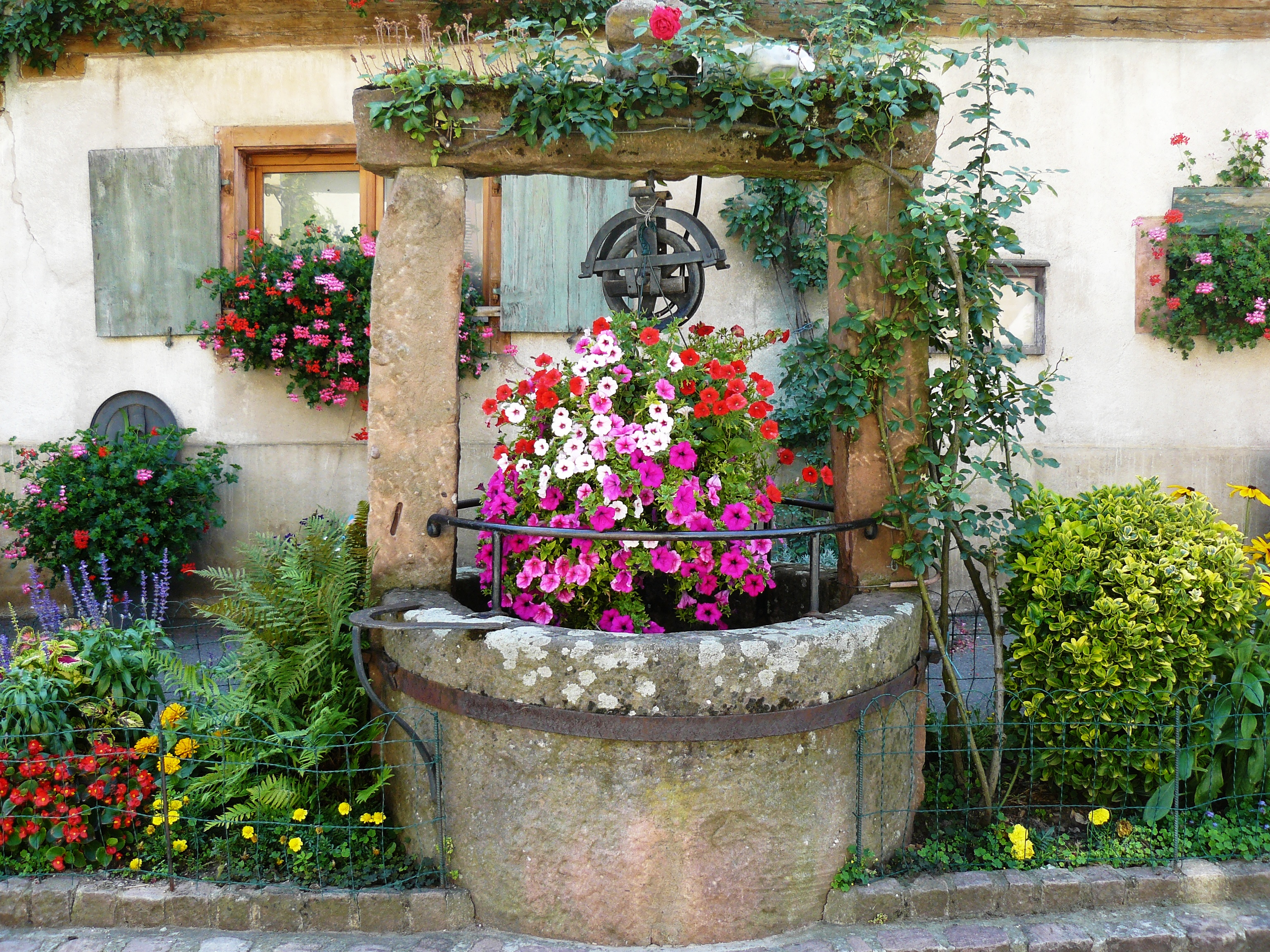 Fontaine circulaire du XVe siècle magnifiquement décorée